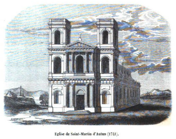 Église de l'abbaye Saint-Martin d'Autun, près d'Autun, Saône-et-Loire, Bourgogne, France. Apparence en 1741. The location coordinates given here below are approximate (+/- 500m)